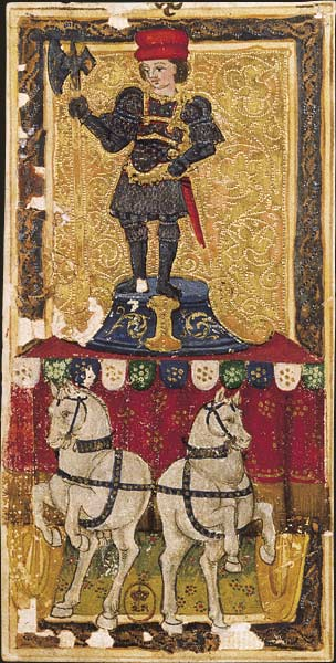 Charles VI (or Gringonneur) Deck; Le tarot dit de Charles VI